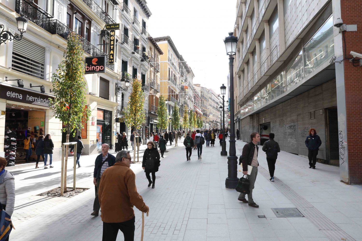 Carretas estrena imagen con el peatón como protagonista. Se trata de una apuesta por la sostenibilidad y el ahorro energético, con nuevas medidas que además mejoran el medio ambiente. Con un presupuesto de 791.034,76 euros, las obras se han realizado sobre 224 metros de calle, en un total de 2.963 m2. Se mejora la accesibilidad y se potencian los consumos energéticos. 21/11/2018. El delegado de Economía y Hacienda y concejal de Centro, Jorge García Castaño y el delegado de Desarrollo Urbano Sostenible, José Manuel Calvo, han visitado, hoy miércoles 21 de noviembre, la reapertura de la calle Carretas tras las obras de peatonalización que se han llevado a cabo en los últimos meses.